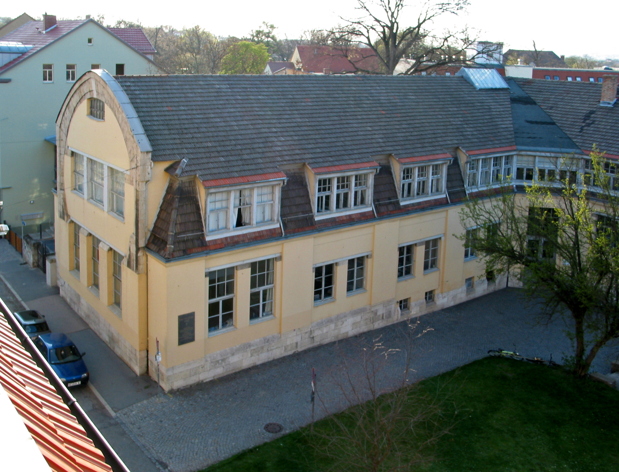 Blick auf den ehem. Südflügel des Kunstgewerbeschulbaus (heute "Van-de-Velde-Bau" genannt), welcher 1906 nach den Entwürfen von Henry van de Velde für die "Großherzoglich-Sächsische Kunstgewerbeschule Weimar" errichtet und zwischen 1919 und 1925 vom "Staatlichen Bauhaus zu Weimar" genutzt wurde. Heute ist das gebäude Sitz der Fakultät Gestaltung der "Bauhaus-Universität Weimar" und gehört seit 1996 zum Weltkulturerbe der UNESCO. Geschwister-Scholl-Straße 7, Weimar/Thüringen.